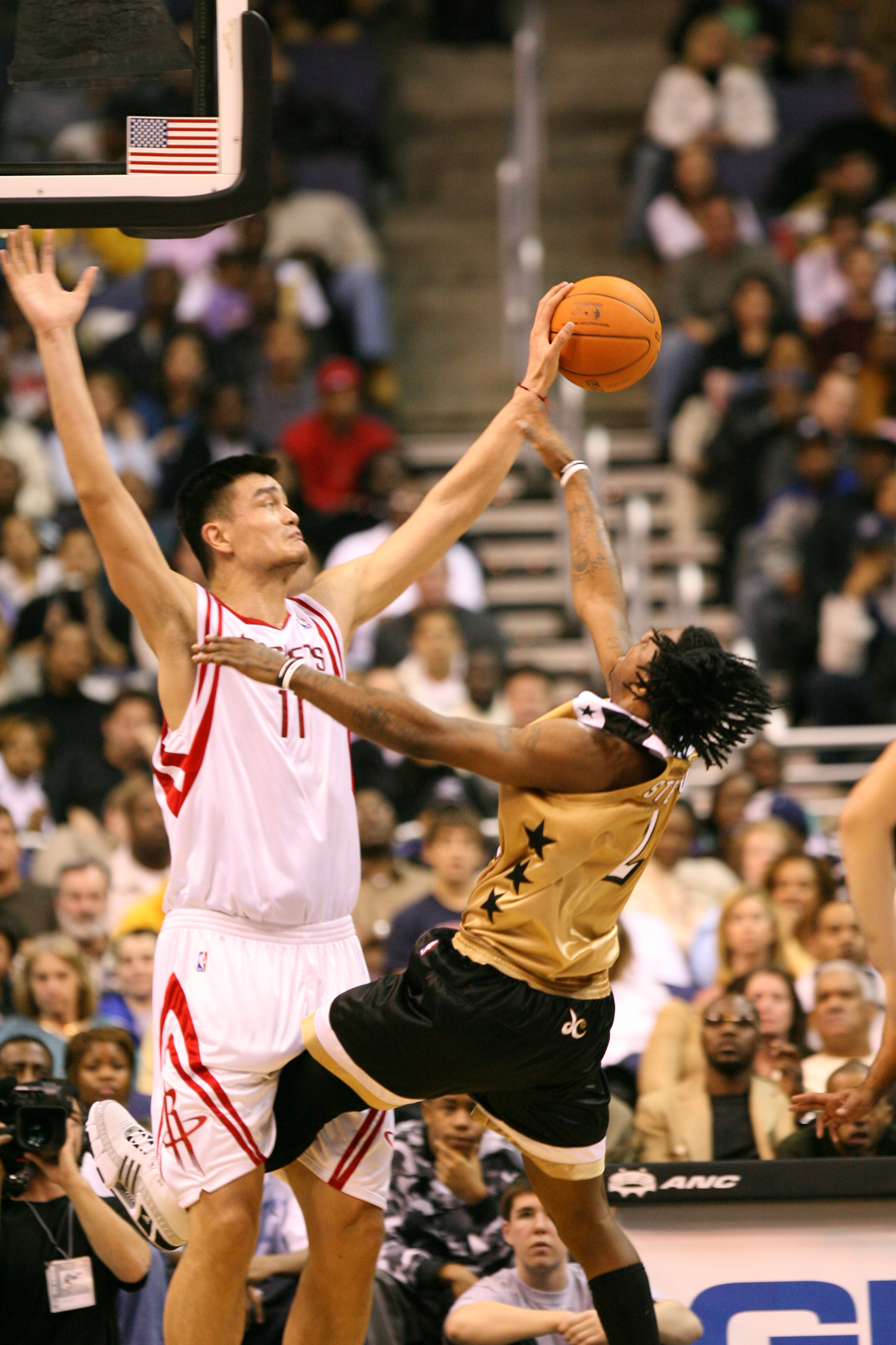 Yao Ming